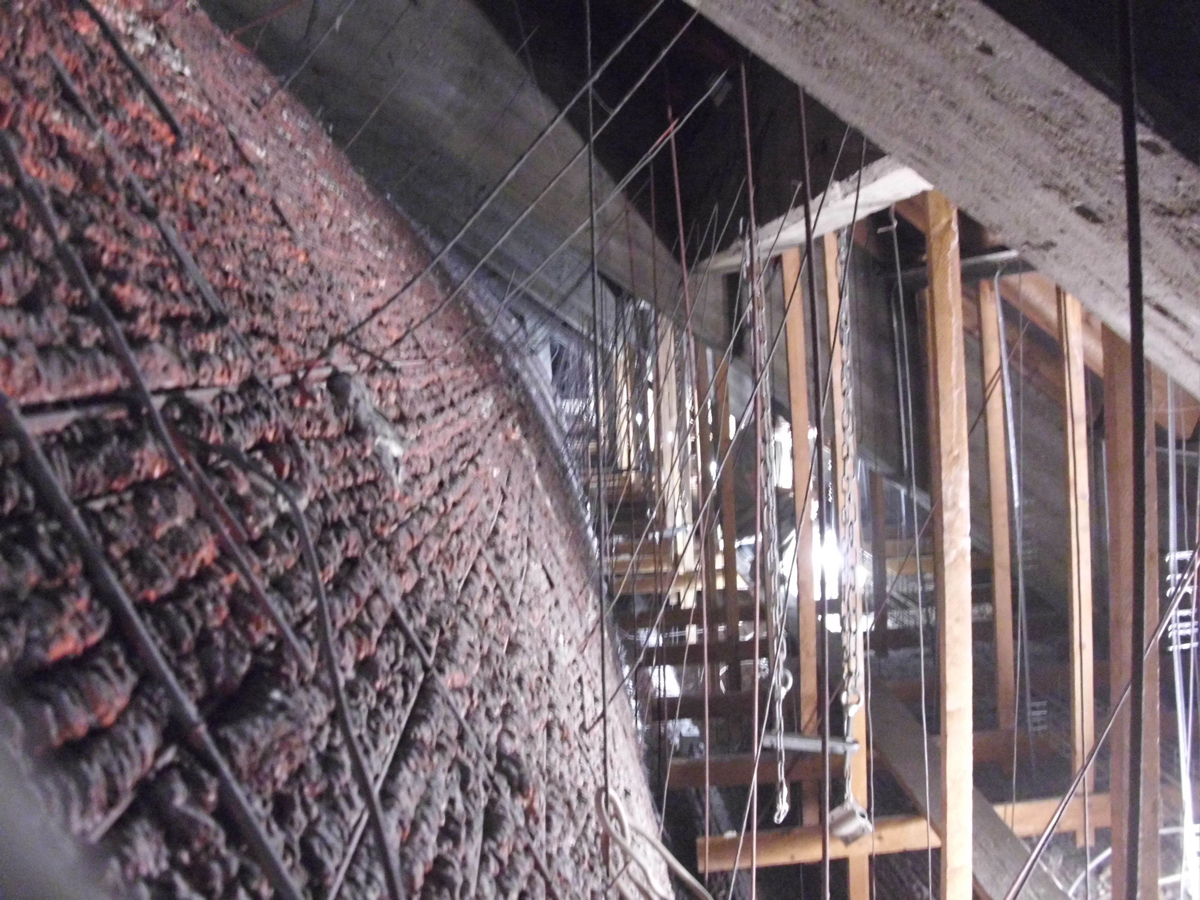 Die Rabitzdecke des Kleinen Michel (Katholische Kirche St. Ansgar von Jean Charles Moreux von 1952-1955). Das Tonnengewölbe hängt an Stahldrähten an der Stahlbetonkonstruktion des Dachstuhls.